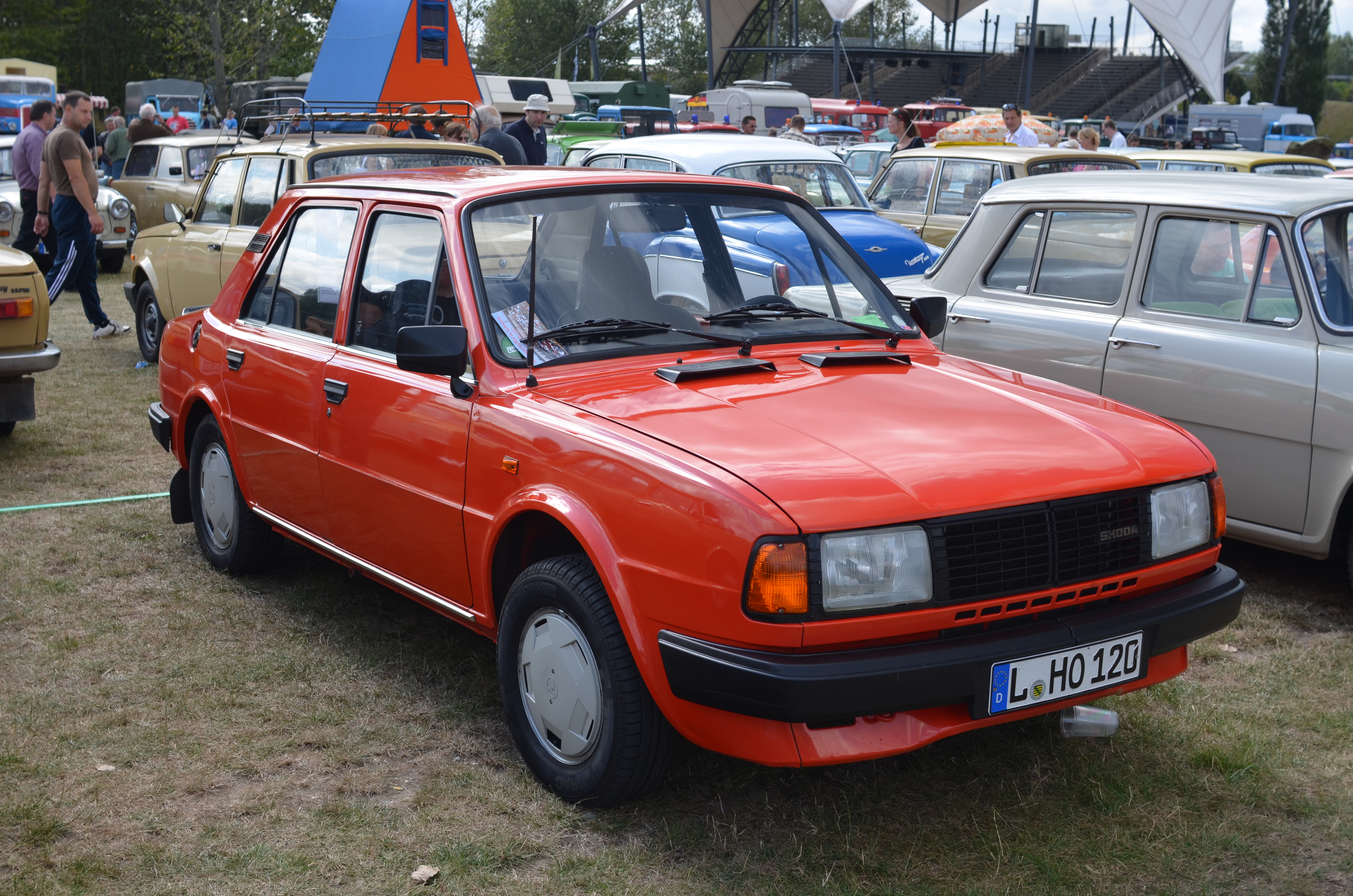 Skoda